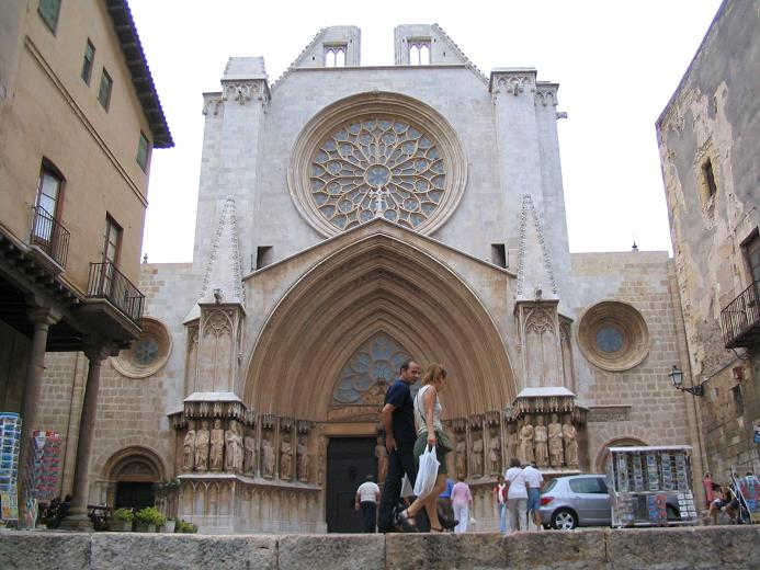 Photographie personnelle de la cathédrale de Tarragone en Espagne.